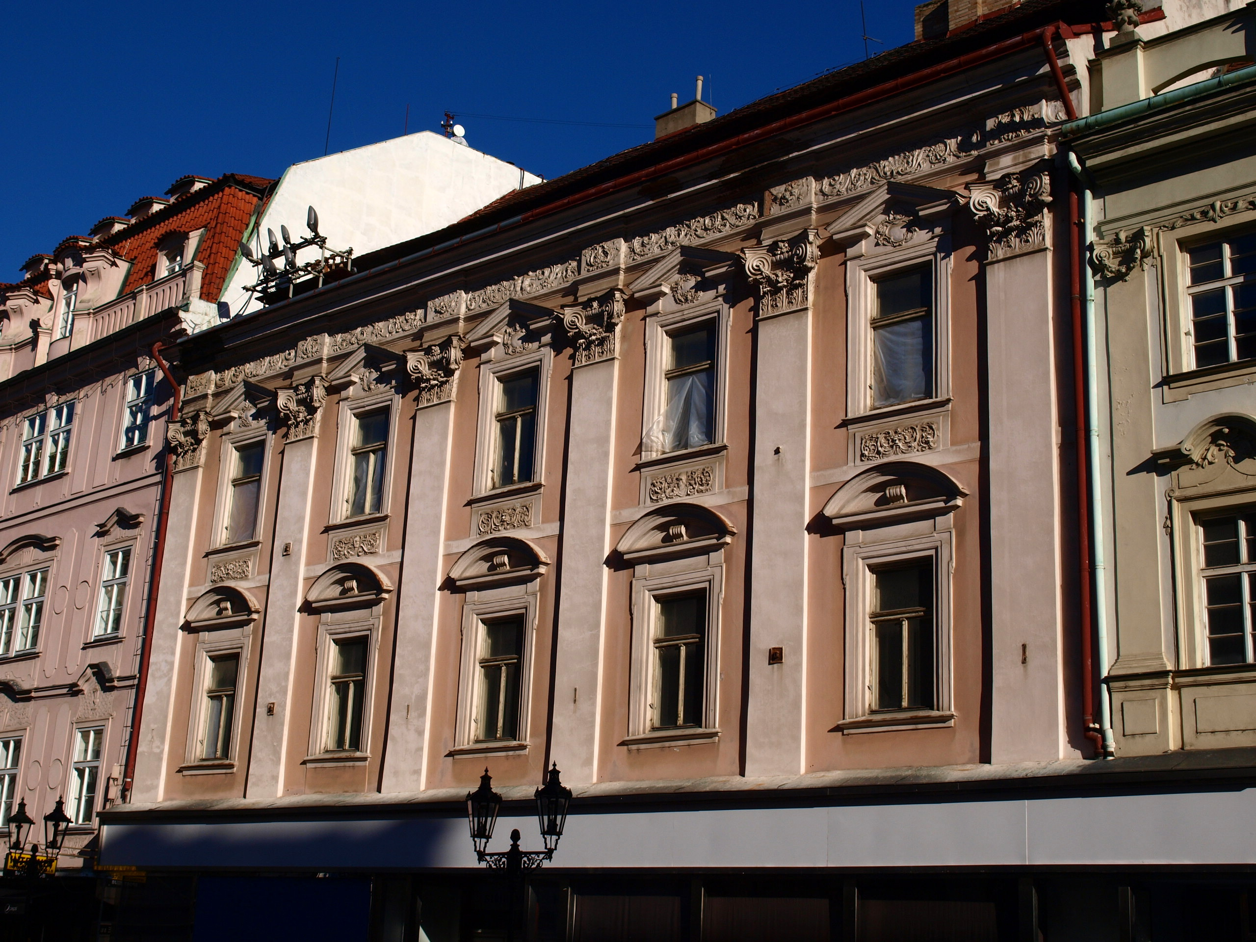 Palác Hrobčických (U Tobolky)